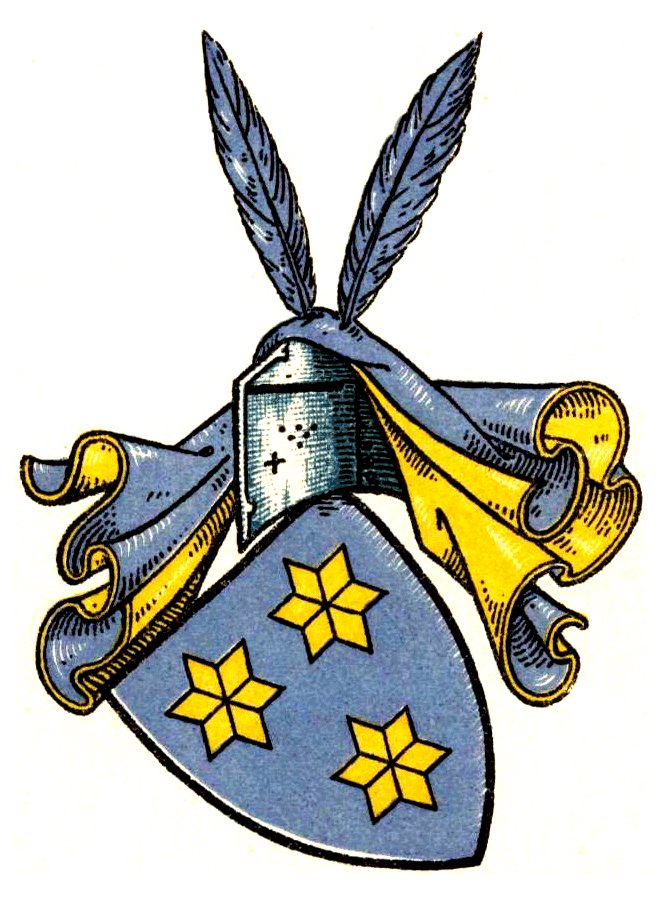 Stammwappen der von Rittberg